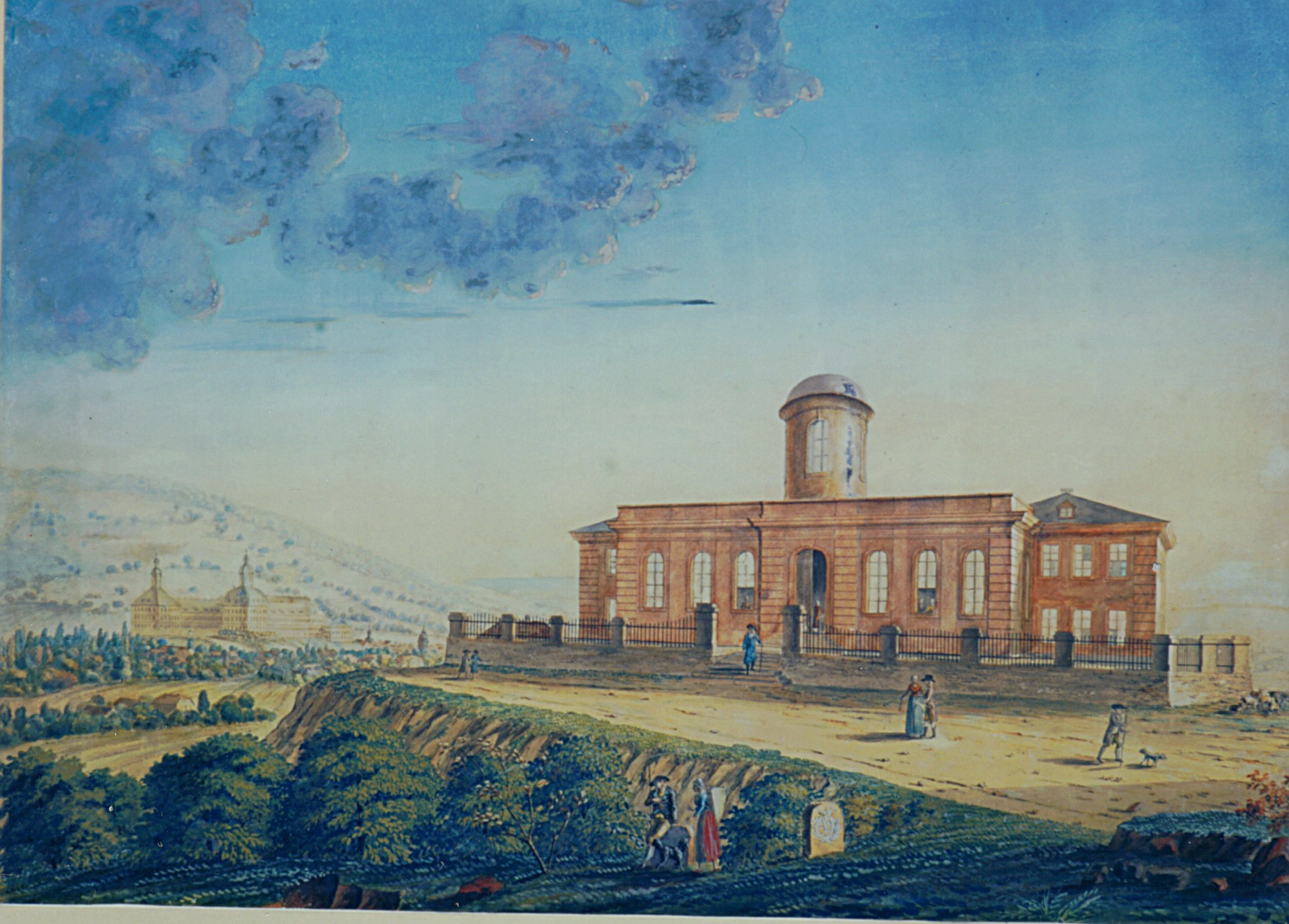 Seeberg Sternwarte Gotha um 1800 Aquarell Forschungs- und Landesbibliothek Gotha